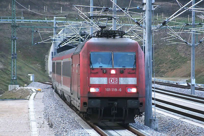 Bild vun de Wiki FRESH MKIG.jpg vum Benotzer Sese Ingolstadt